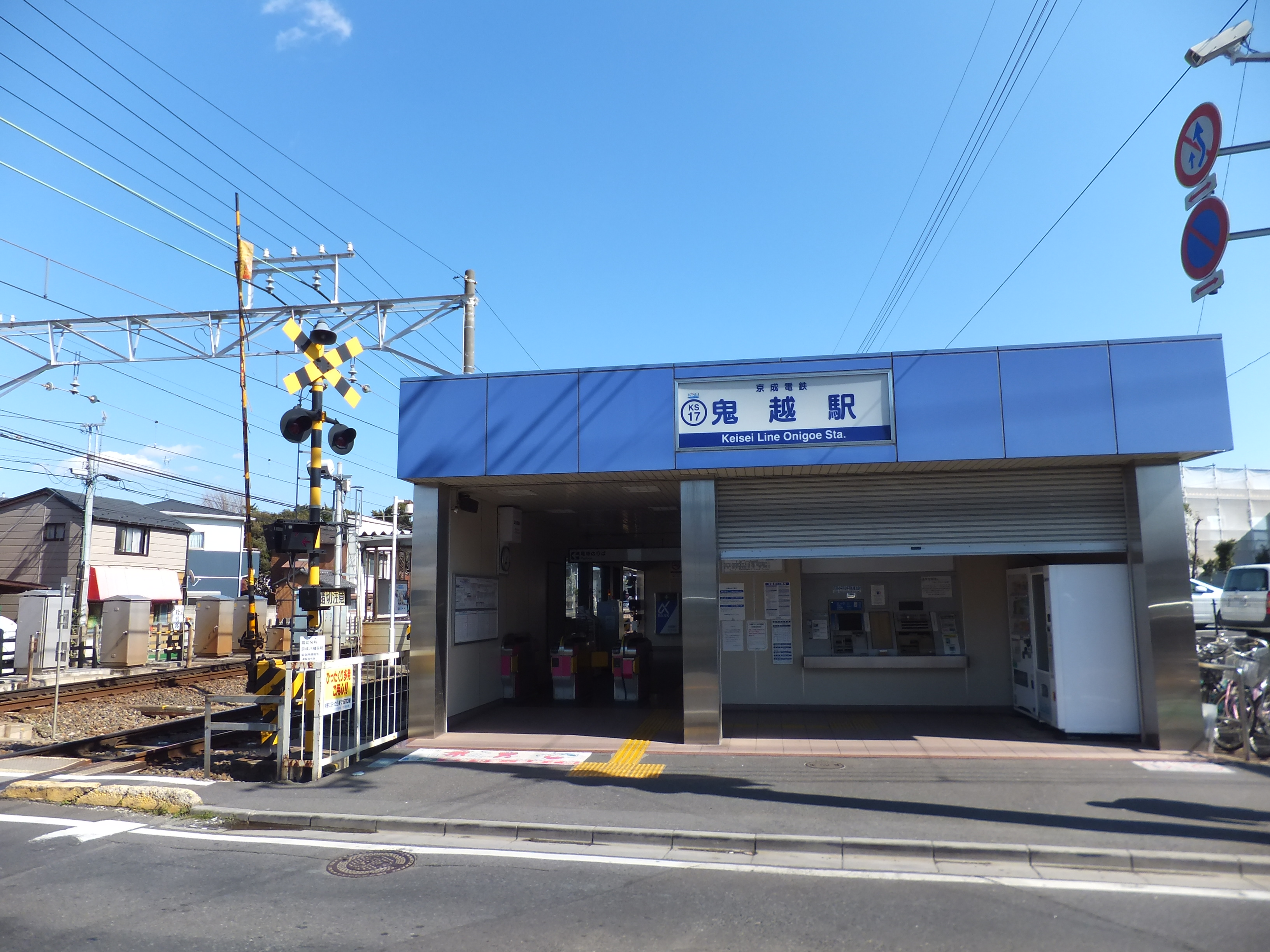 京成電鉄鬼越駅